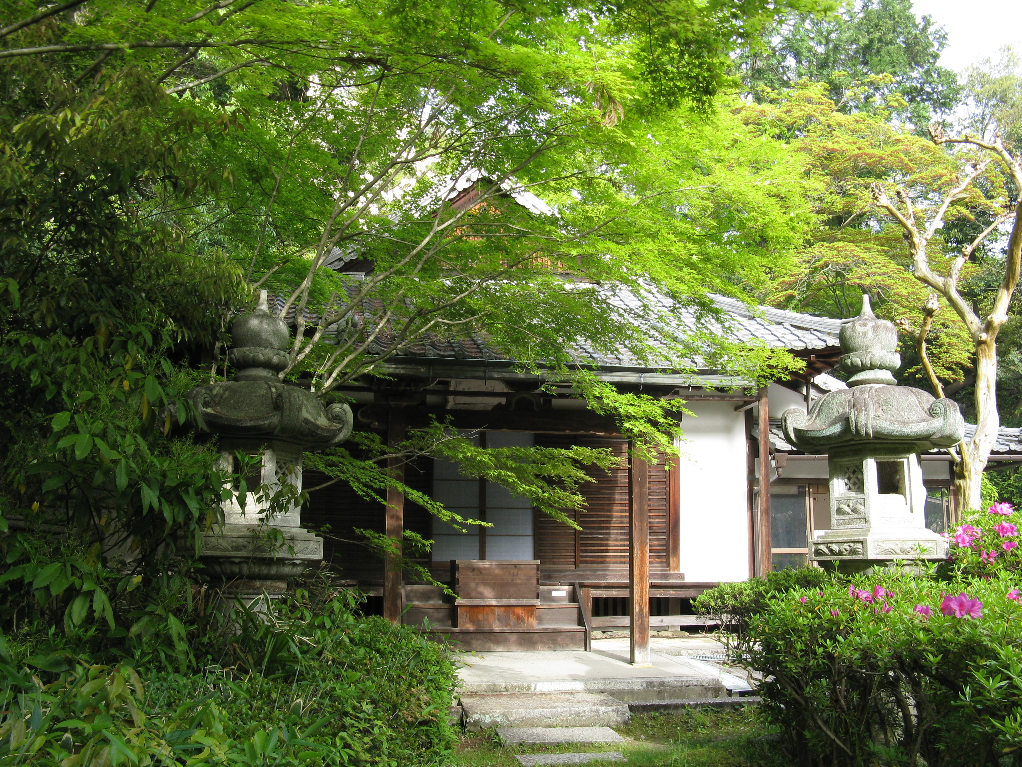 来迎院